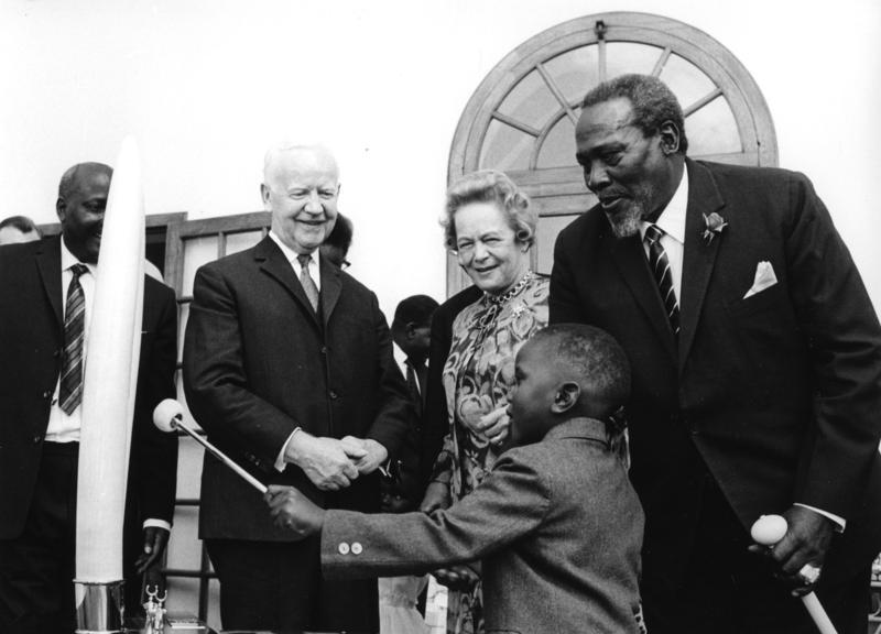 Februar 1966 Staatsbesuch, Bundespräsident Dr. Heinrich Lübke in Kenya v.l.n.r.: Dr. Heinrich Lübke, Frau Wilhelmine Lübke, Yomo Kenyatta (Präsident der Republik Kenya)